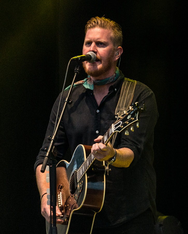 Sven-Ingvars uppträder inför en fulltalig publik på Gröna Lund i Stockholm den 12 augusti 2016. Oscar Magnusson på gitarr.